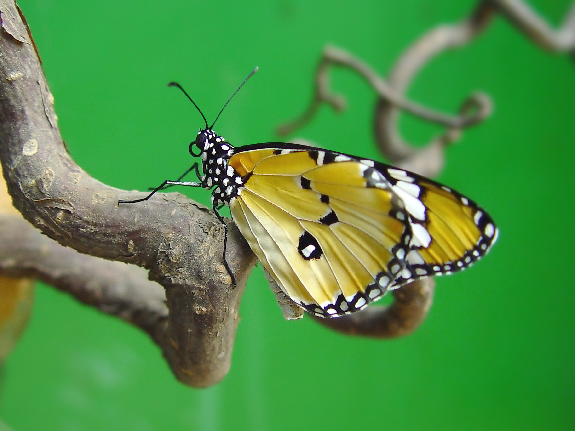 Beschreibung: Danaus chrysippus (afrikanischer Monarch) Aufnahmedatum: Fotografiert am 12. April 2003 Fotograf: ArtMechanic